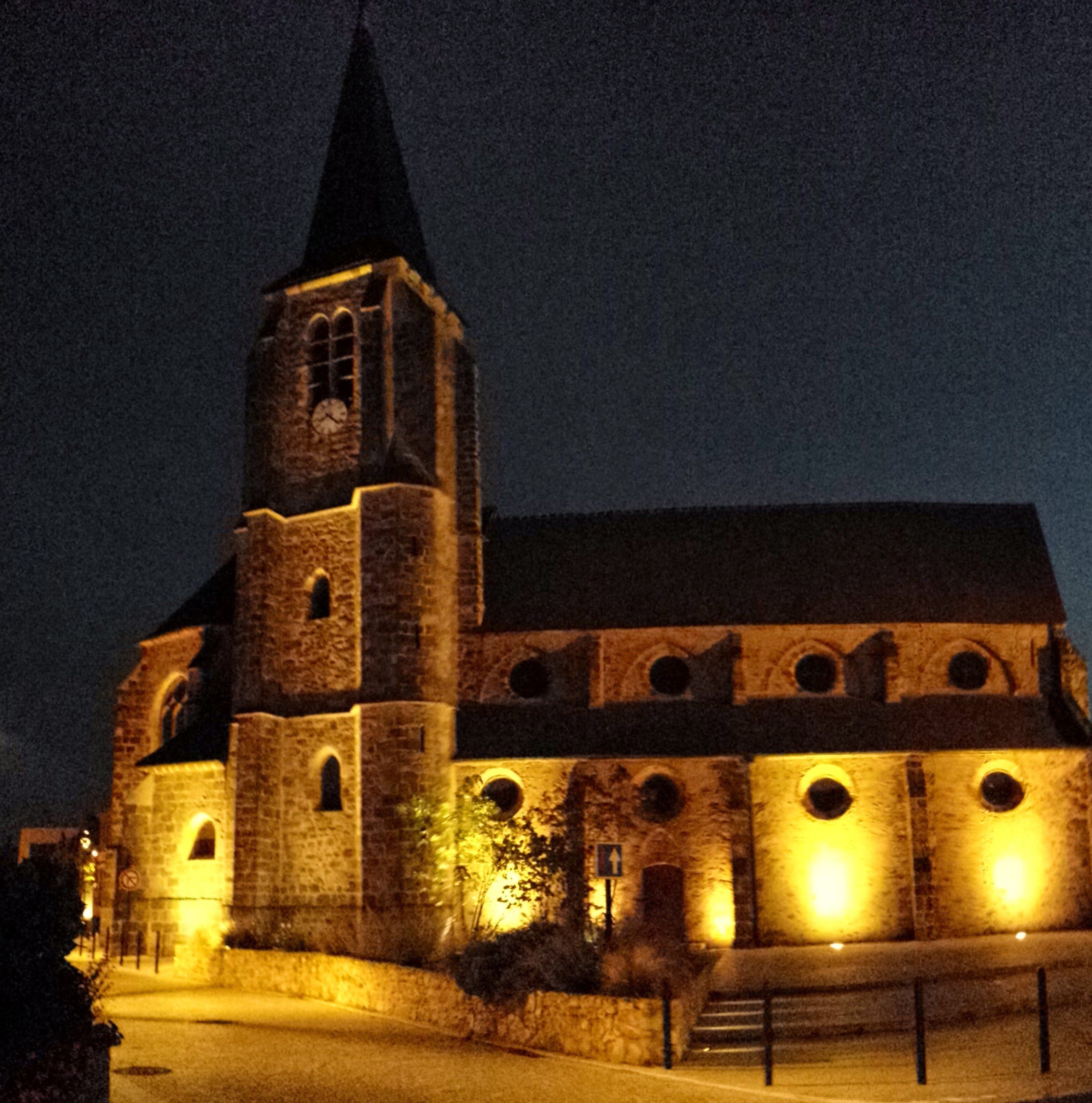 L'église Saint-Victor est une église gothique construite dans le centre ville de Guyancourt.